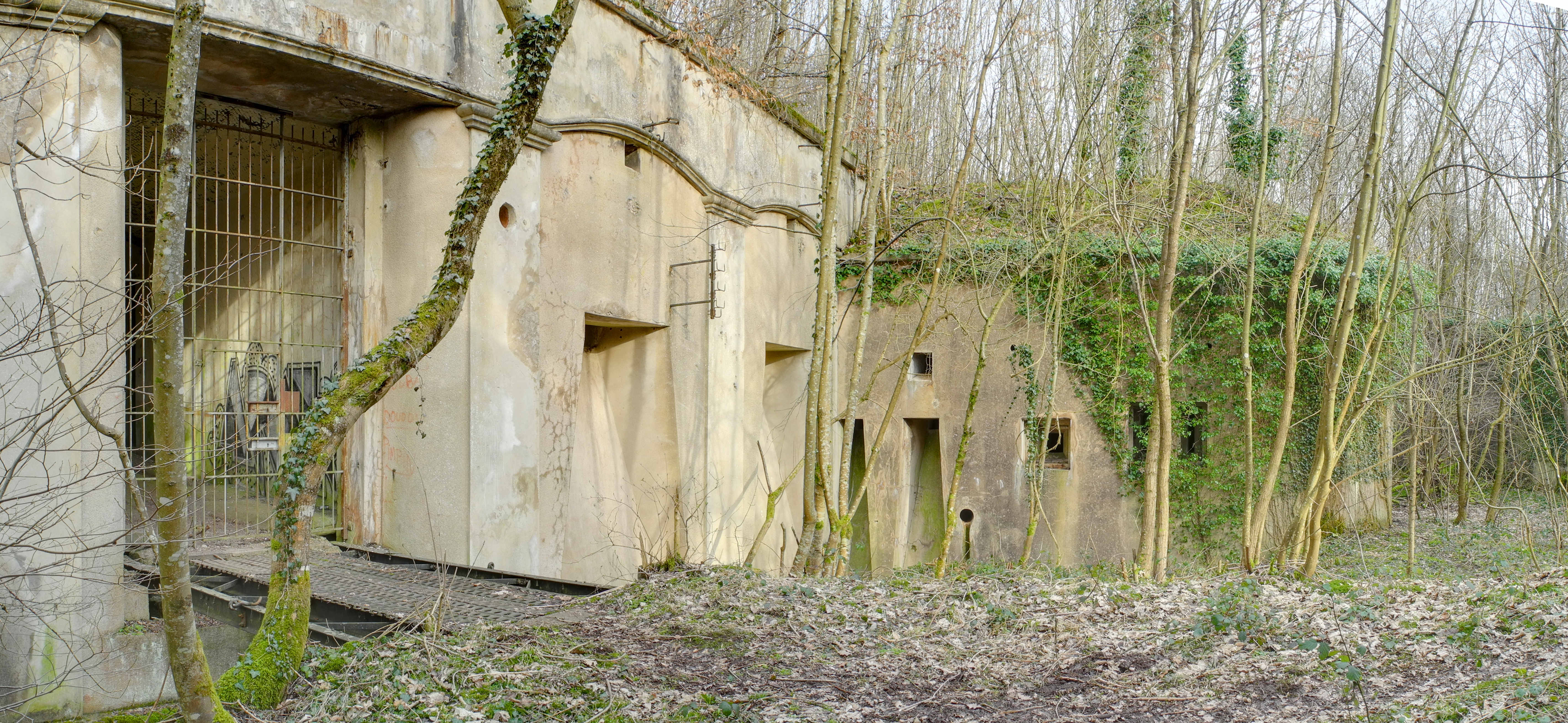 L'entrée. Roppe fortifications (HDR).